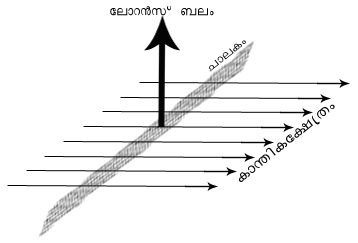 ചാലകം കാന്തികക്ഷേത്രത്തിൽ